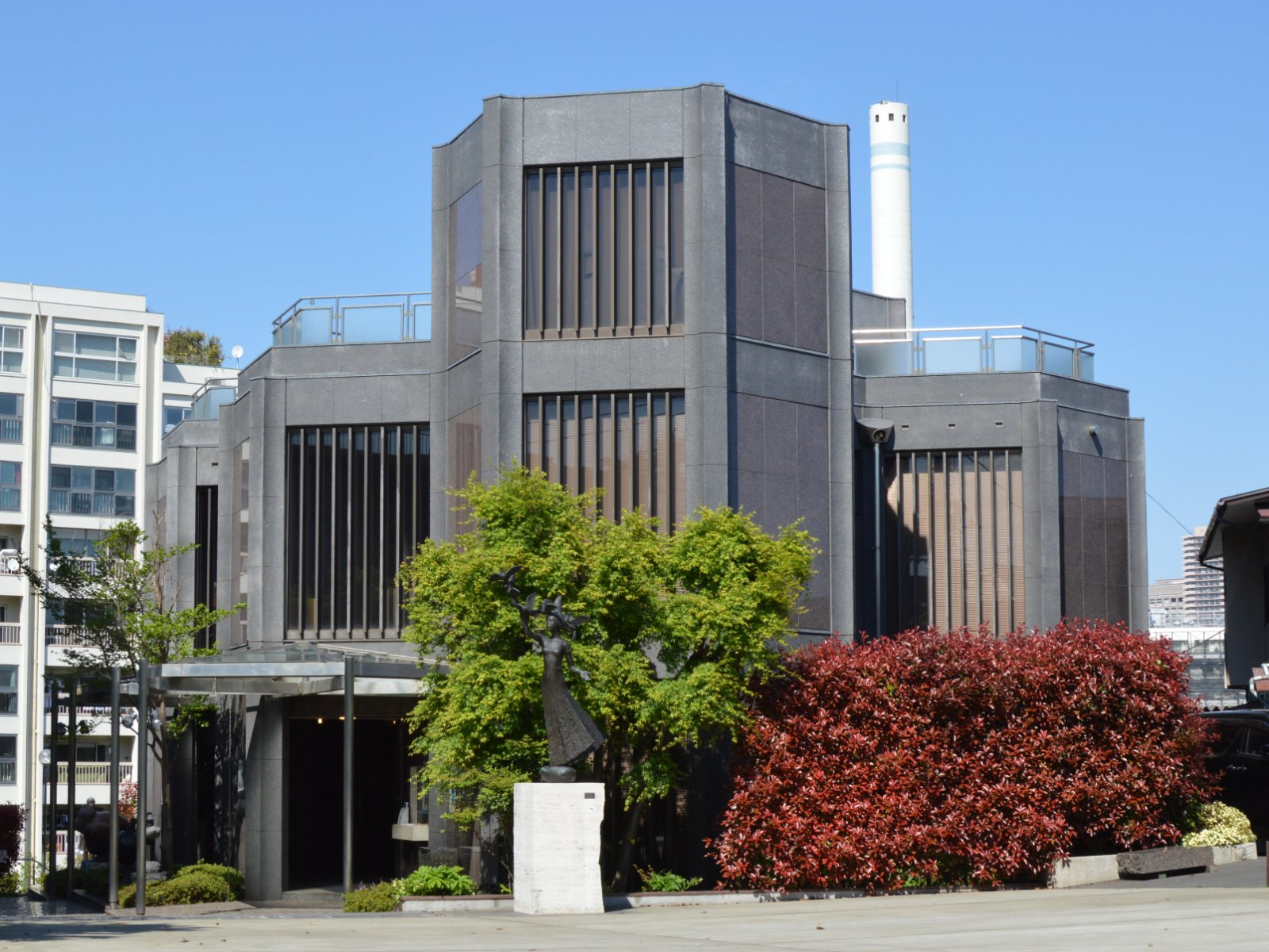 長泉院附属現代彫刻美術館 外観 Museum of Contemporary Sculpture, Meguro, Tokyo, Japan